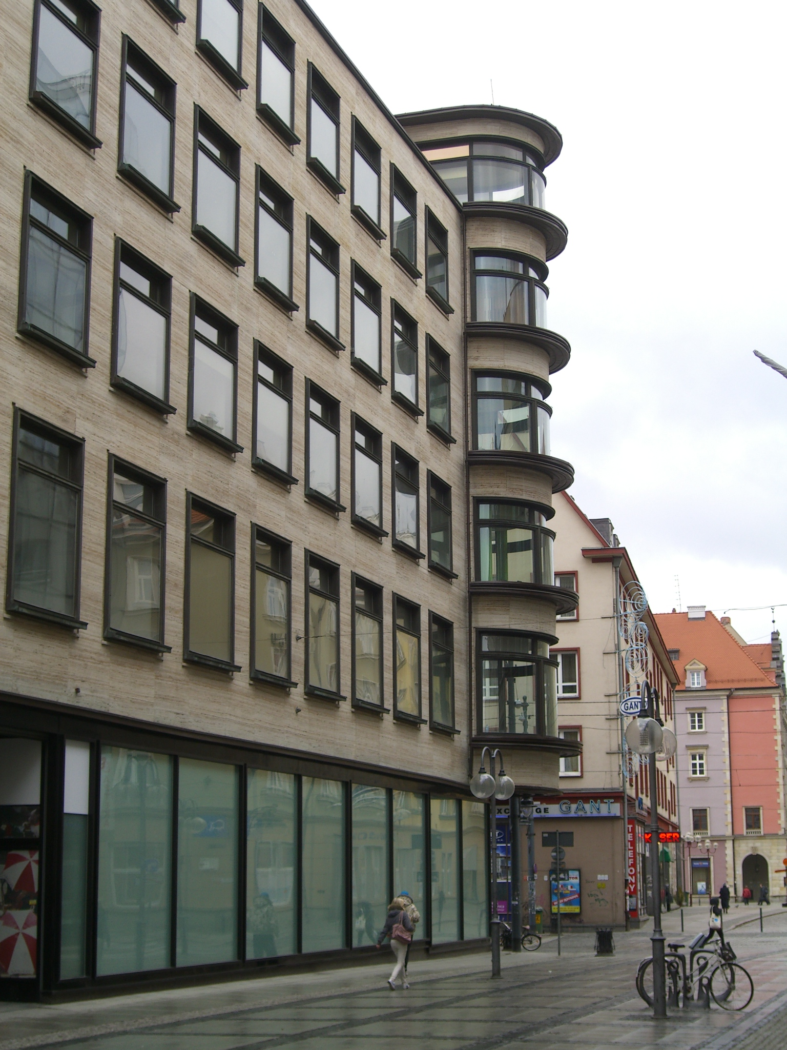 Breslau, Gebäude von Mendelsohn